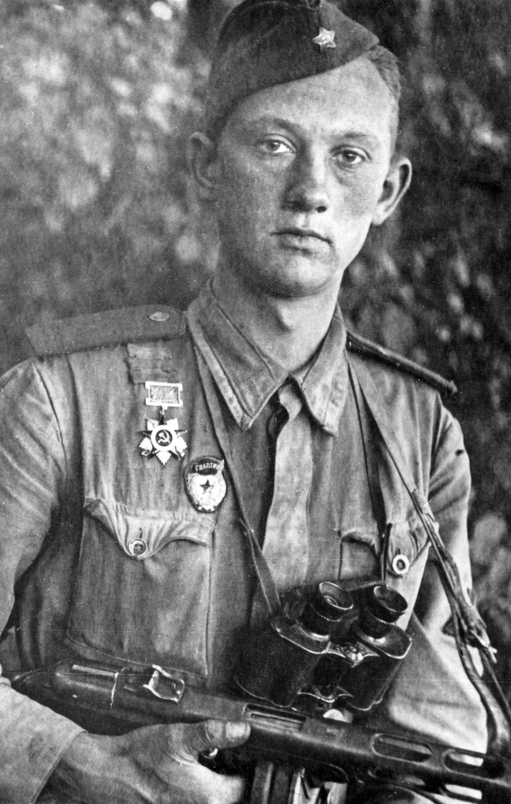 Фотография поэта Валентин Давыдович Динабургского, сделанная во время Великой отечественной войны.